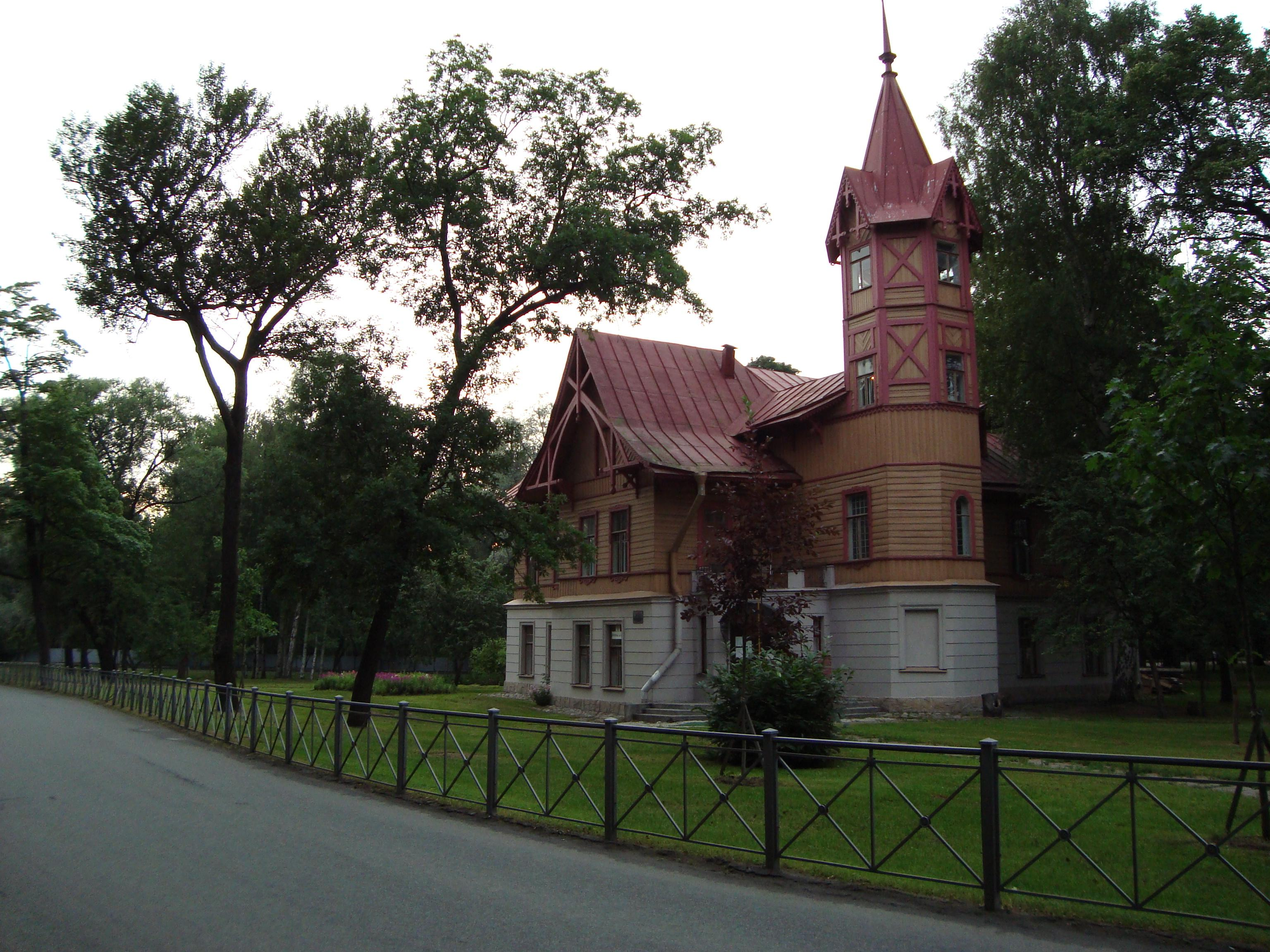 Боковая аллея, 1